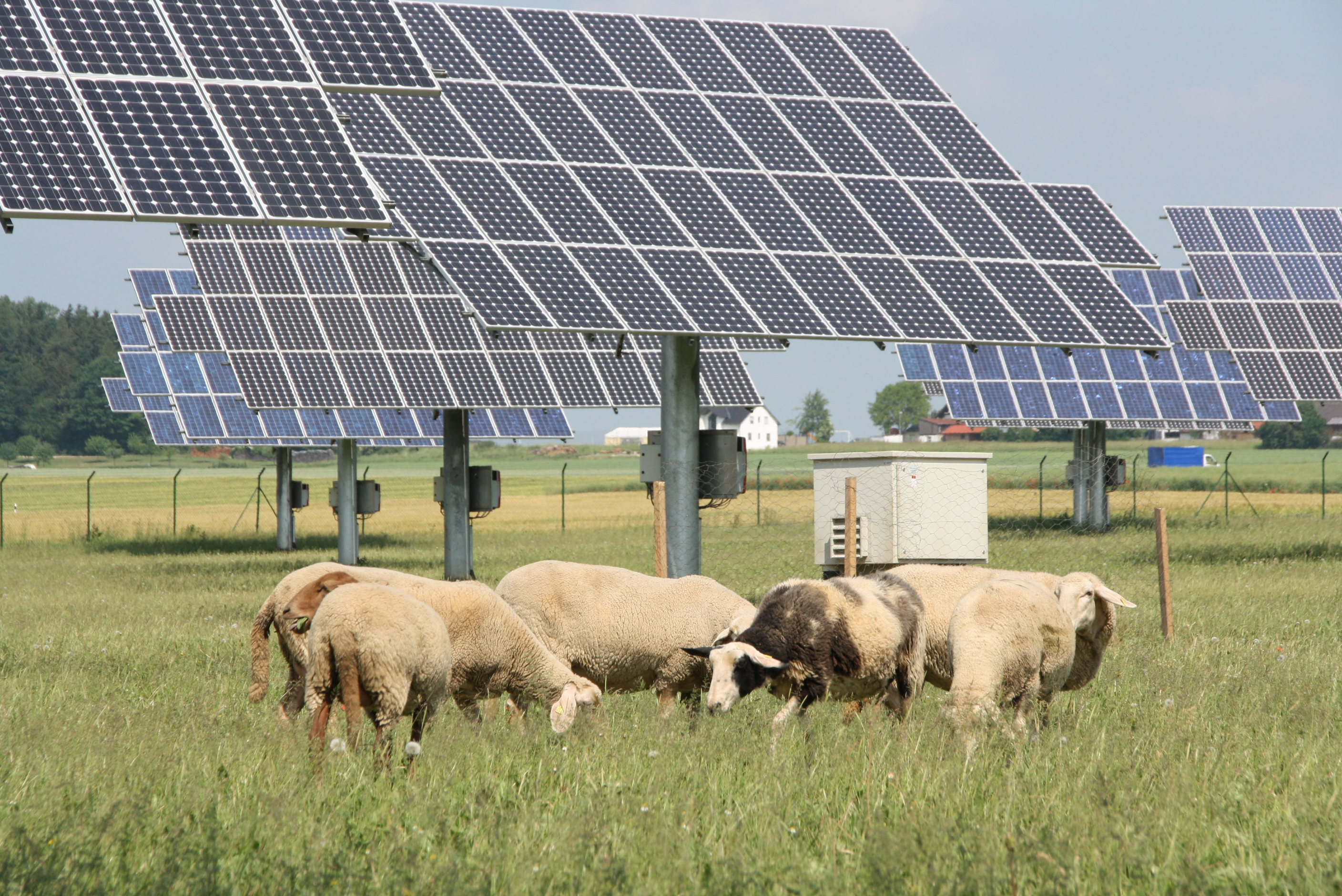 Solarpark Untermöckenlohe: Die Anlage ist so ausgelegt dass sie gleichzeitig als Weide genutzt werden kann.